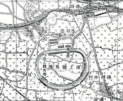 池上競馬場 地図